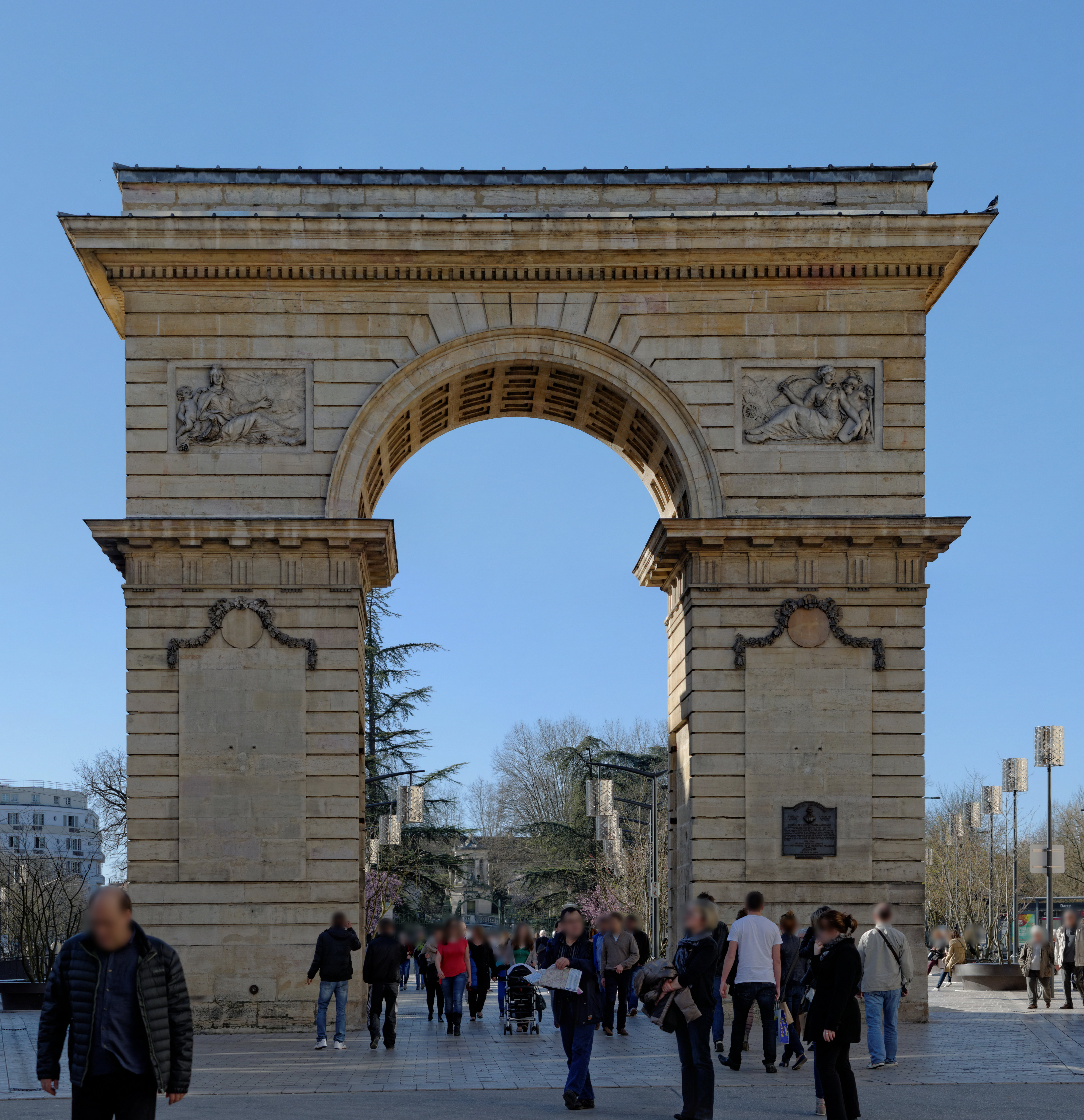 Porte Guillaume, Place Darcy, à Dijon (France), vue depuis la rue de la Liberté.